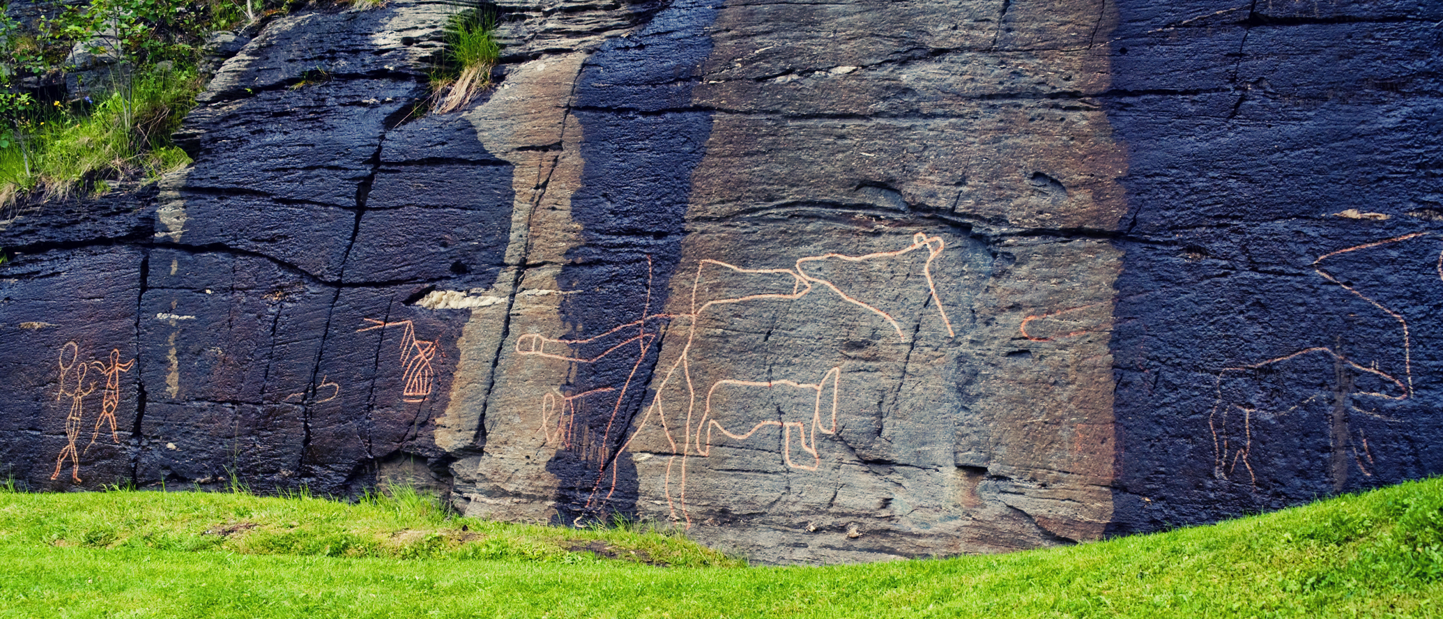 Skavberg 1. Helleristning i Tromsø, fra Steinalderen.